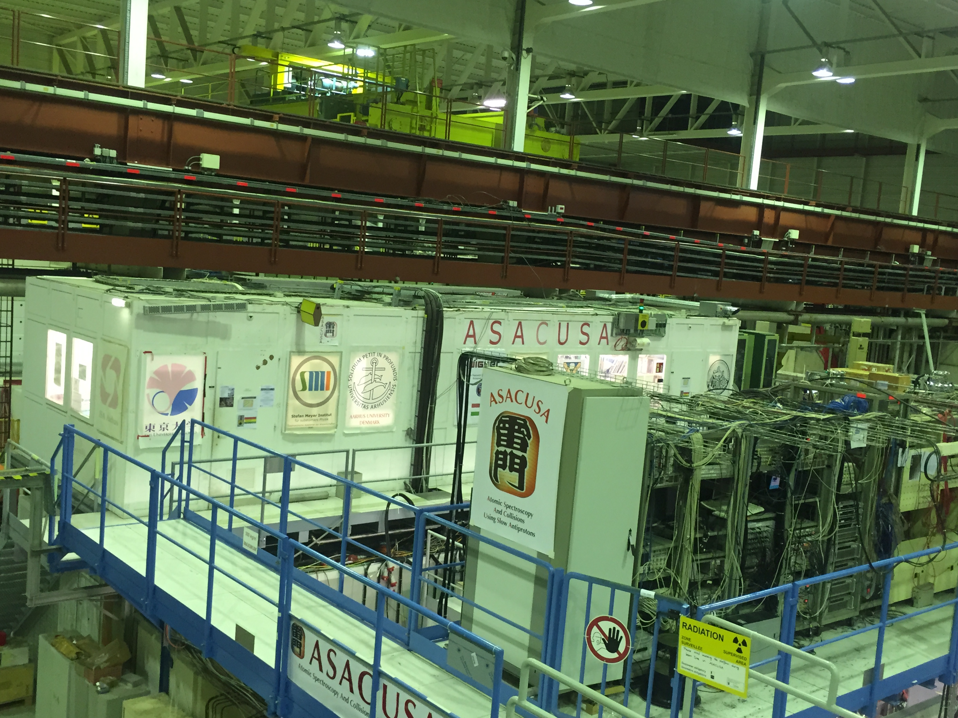 ניסוי ASACUSA